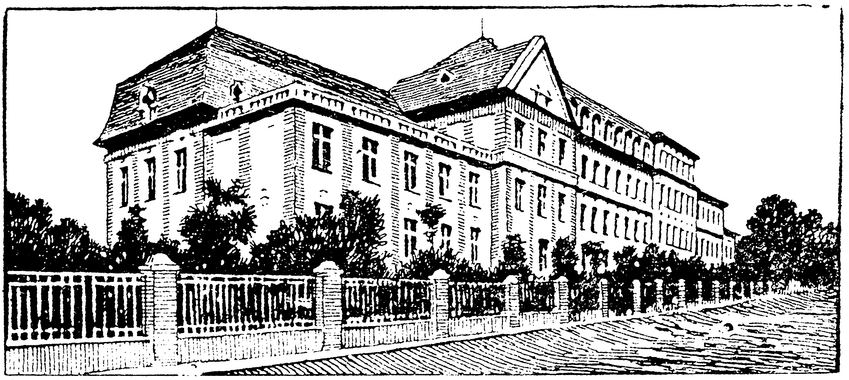 Budova Arcibiskupského gymnázia v Bubenči. Obrázek z titulní strany školního časopisu "Zprávy z Bubenče"